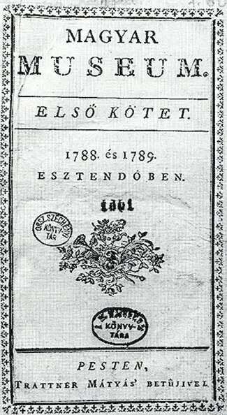 Magyar Museum-1788-1789